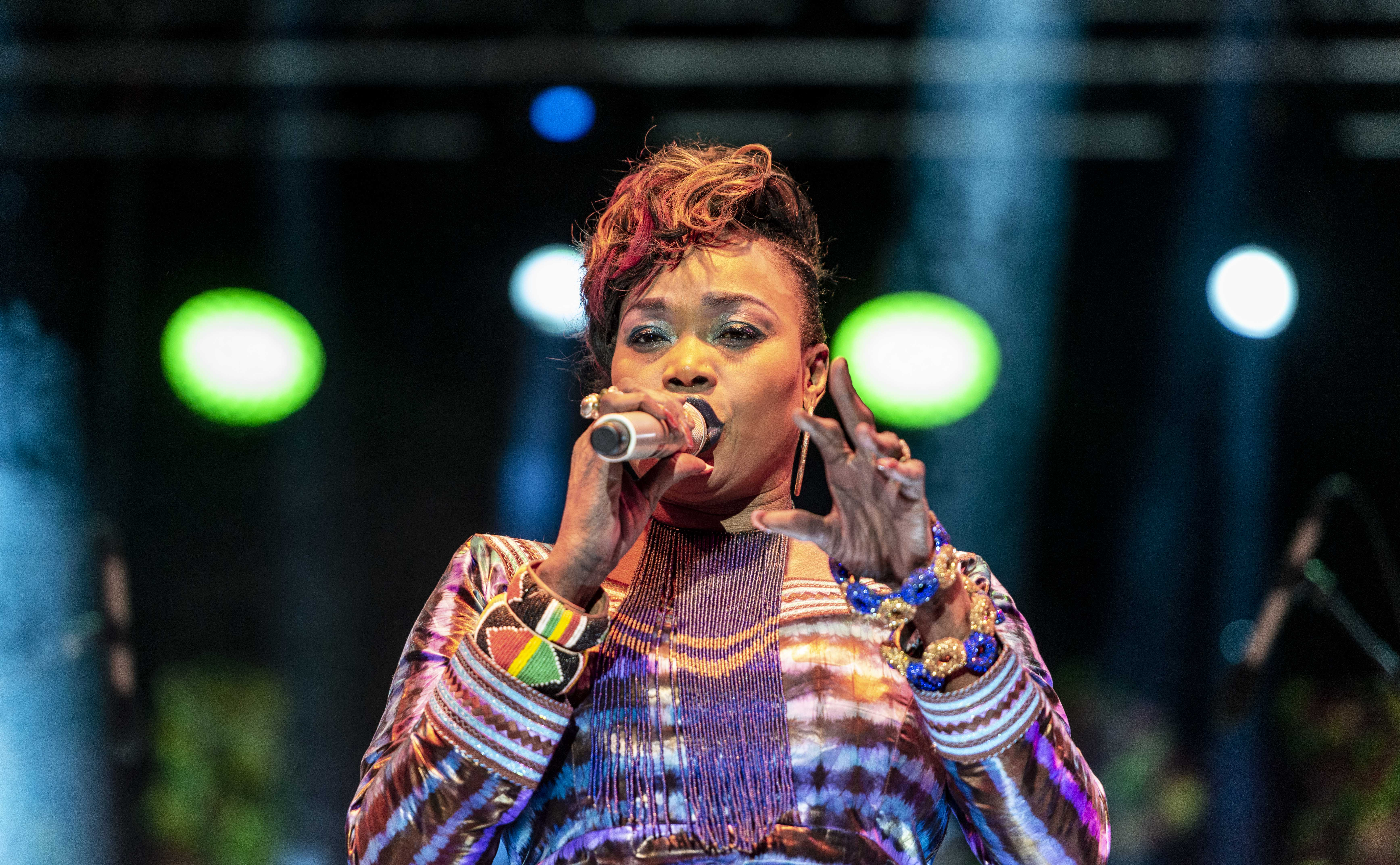 La tarde y la noche de ayer sábado, 12 de mayo, contaron con decenas de propuestas culturales para celebrar las fiestas. En la plaza de Conde de Barajas el atardecer arrancaba con poesía y la música de Tulsa y Abraham Boba. Madrid se preparaba para una noche con músicas de raíz y sus revisiones más contemporáneas, desde el flamenco a la canción africana.